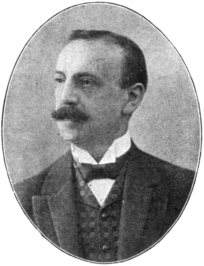 Geheimer Regierungsrat Dr.-Ing. Reinhold Krohn, etatsmäßiger Professor für Statik der Baukonstruktionen, Brücken- und Eisenhochbau an der Technischen Hochschule zu Danzig